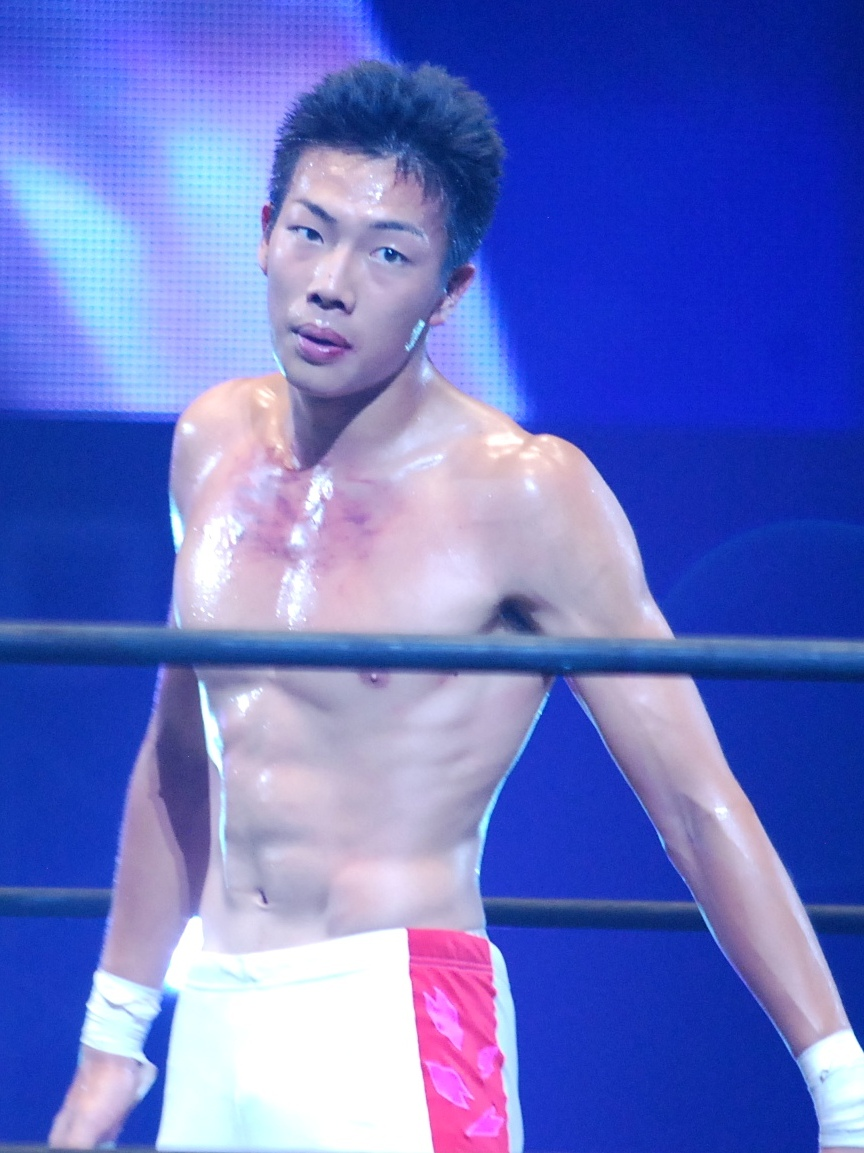 プロレスラー・竹下幸之介の画像